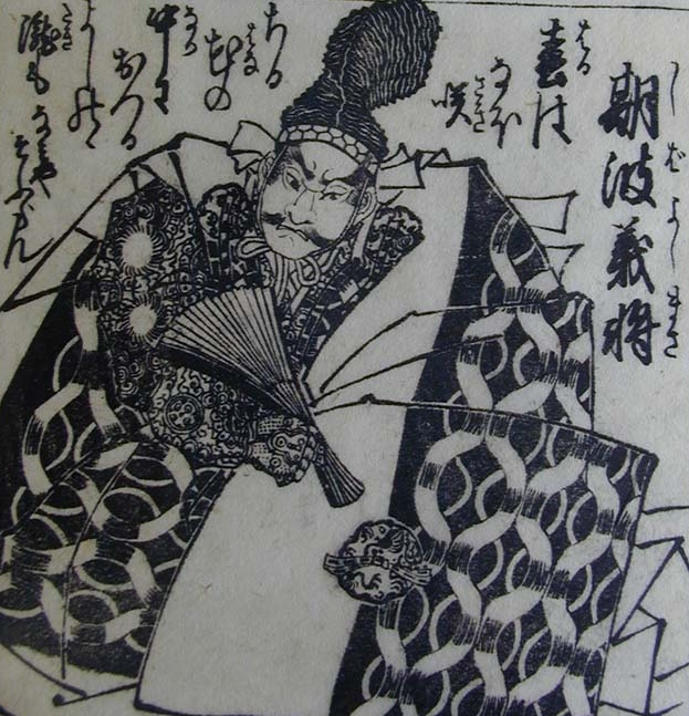 shibayoshimasa